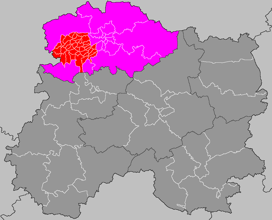 Localisation du canton de Ville-en-Tardenois